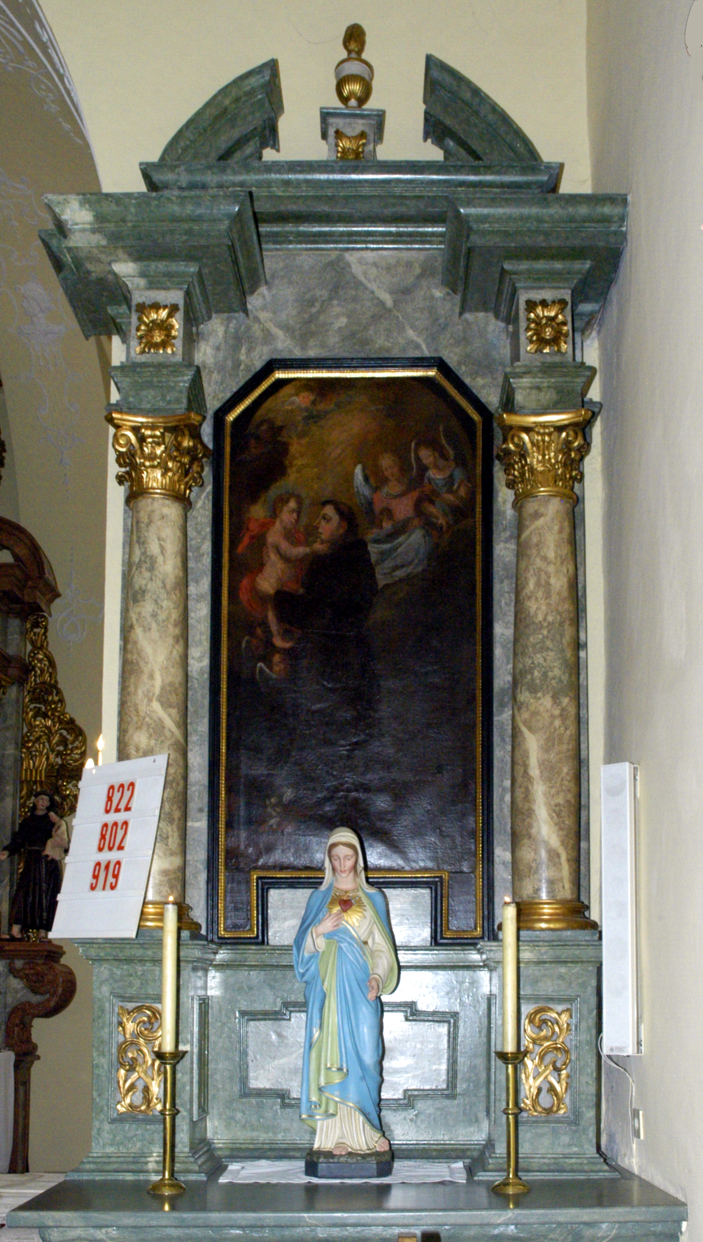 Rechter Seitenaltar der katholischen Filialkirche heiliger Jakob in Limberg